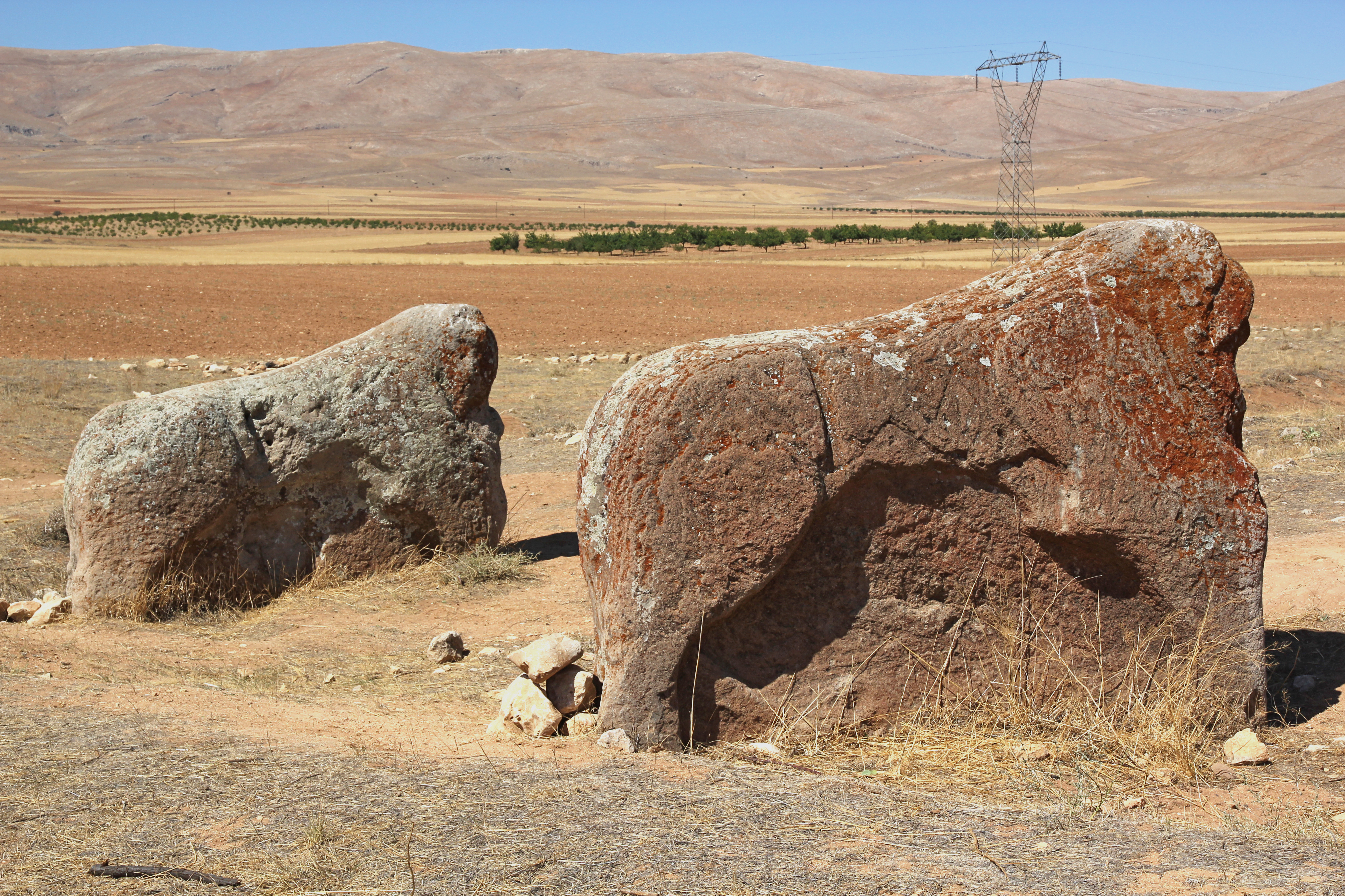 Arslantaş, späthethitische Löwenskulpturen nahe Darende in der türkischen Provinz Malatya, Löwe A